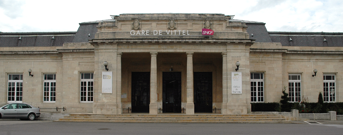 Bahnhof: Gare de Vittel